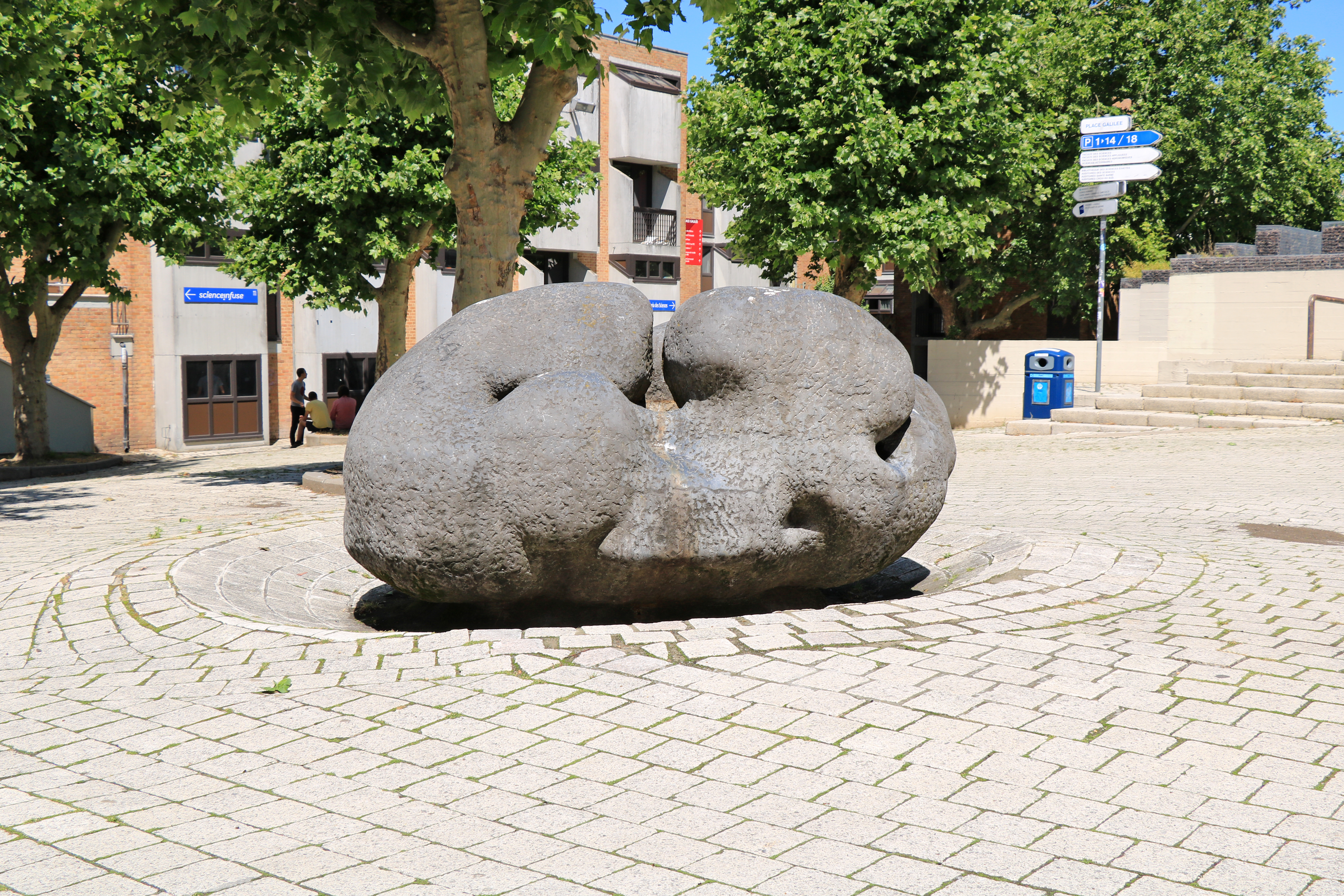 Belgique - Louvain-la-Neuve - place Galilée - sculpture surnommée "Crotte de mammouth" (Jean Willame)